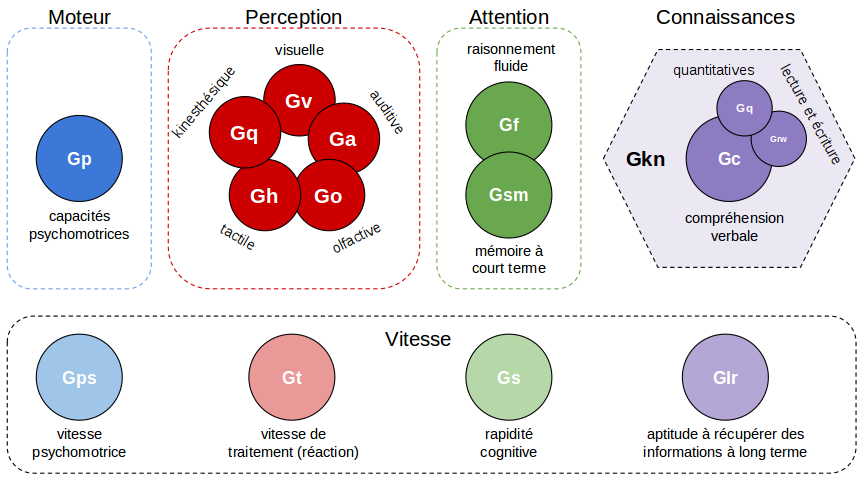 Les facteurs principaux du Modèle de Cattell-Horn-Carroll regroupés en fonction cognitive. Image inspirée de